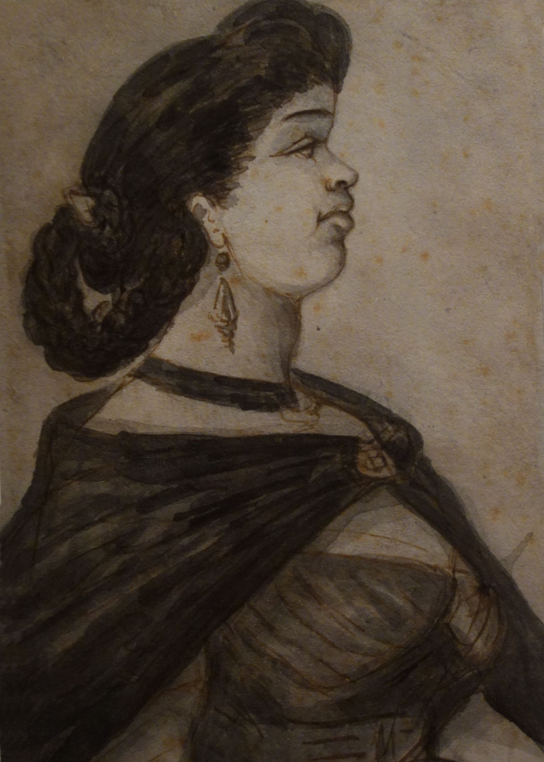 Portait présumé de Jeanne Duval, la compagne de Baudelaire, par Constantin Guys Lavis, encre et aquarelle Collection particulière Jean Bonna